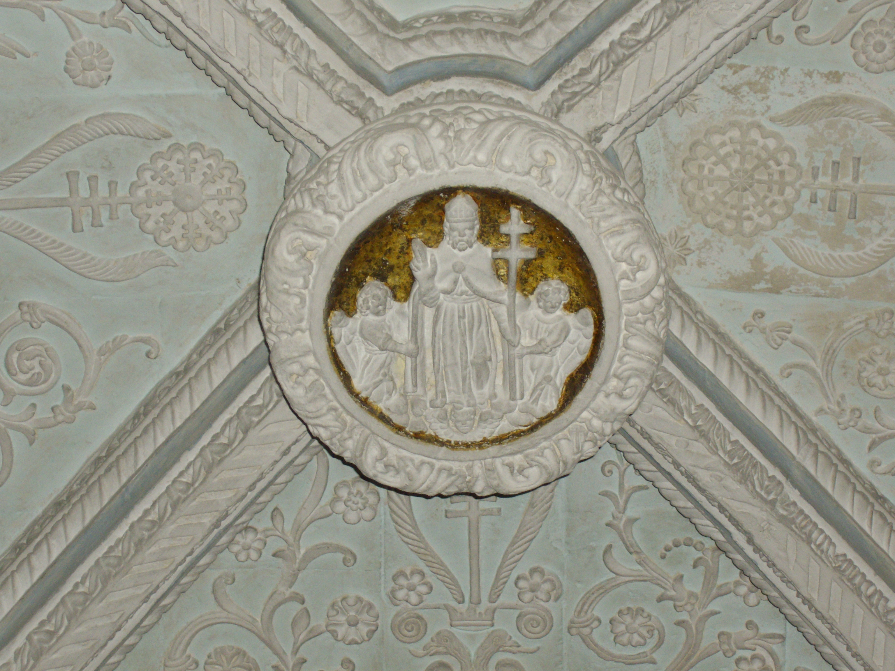 San Lucifero, volta della cappella a lui dedicata nel Santuario dei Martiri - Cattedrale di Cagliari